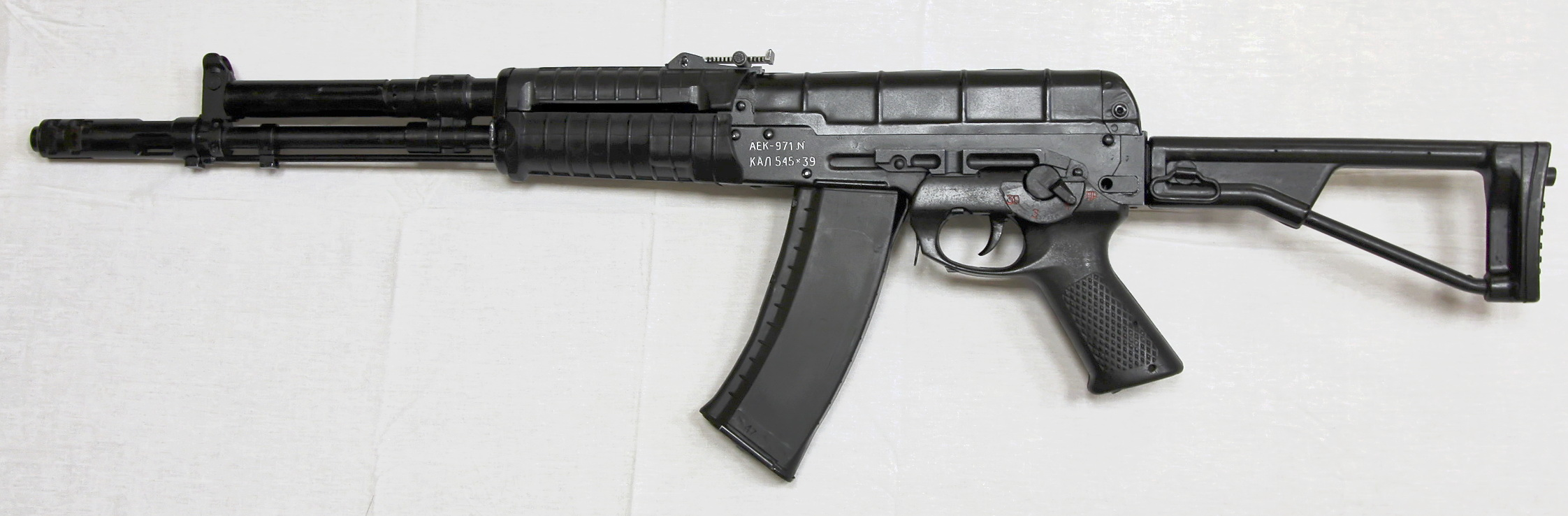 АЕК-971: Вид слева со сложенным прикладом